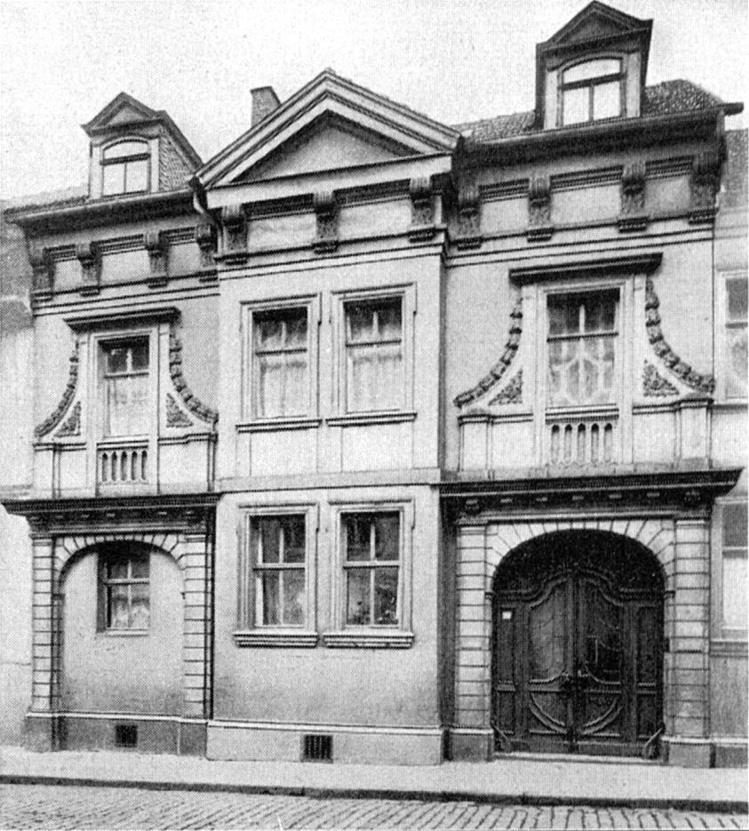 Gotha, Siebleber Straße 24, Stadtpalais der Familie von Wangenheim, später Sitz der „Engelhard-Reyherschen Hofbuchdruckerei“, 2011 abgerissen.